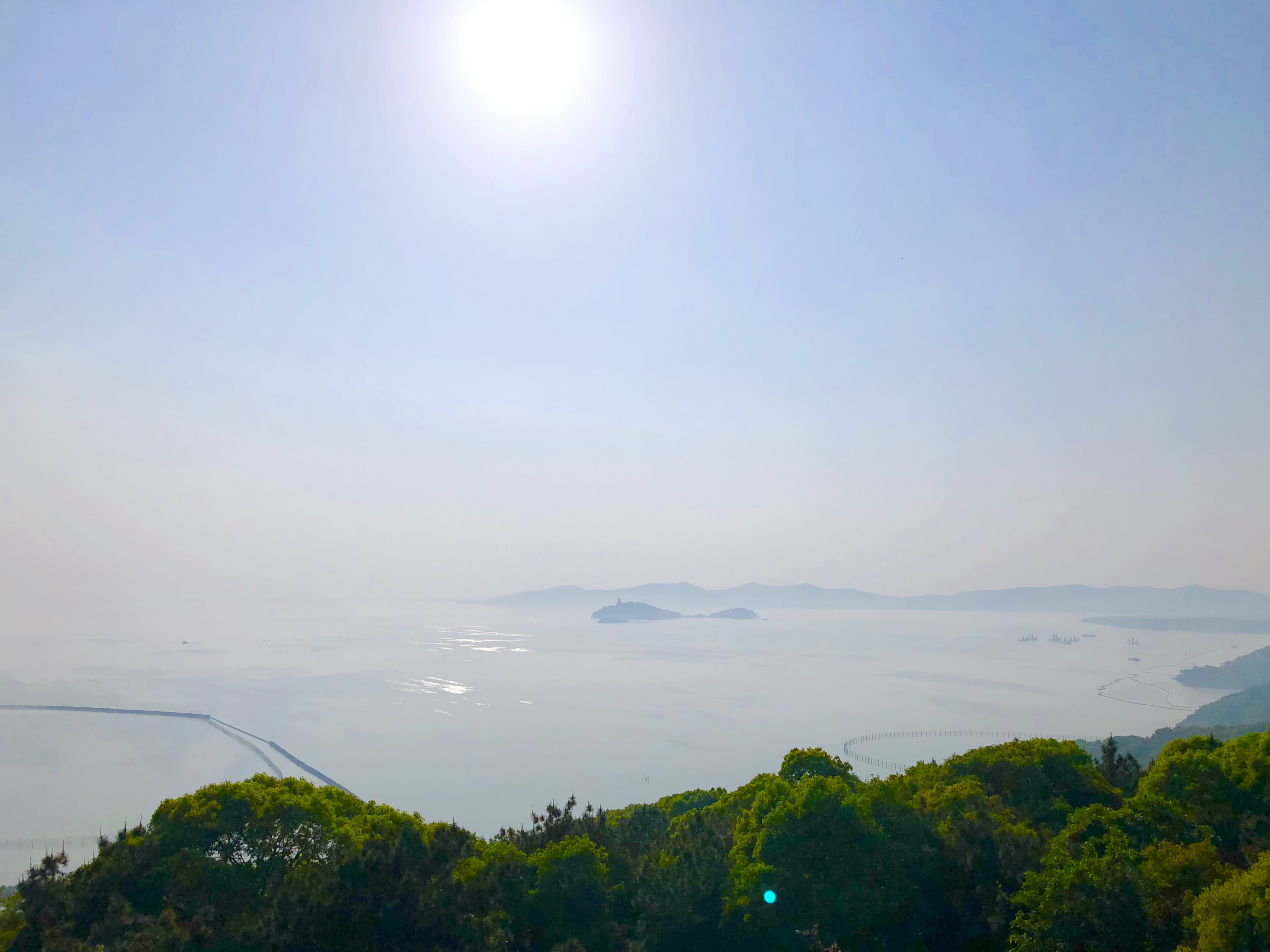 無錫太湖風景，由寶界山頂眺望黿頭渚、三山島